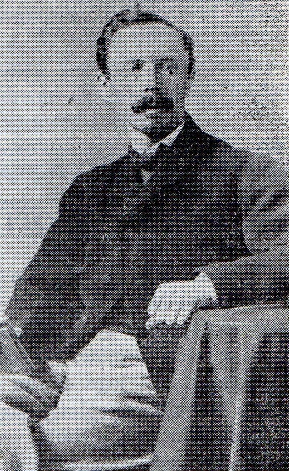 Stanisław Motty, działacz poznański, prawnik.